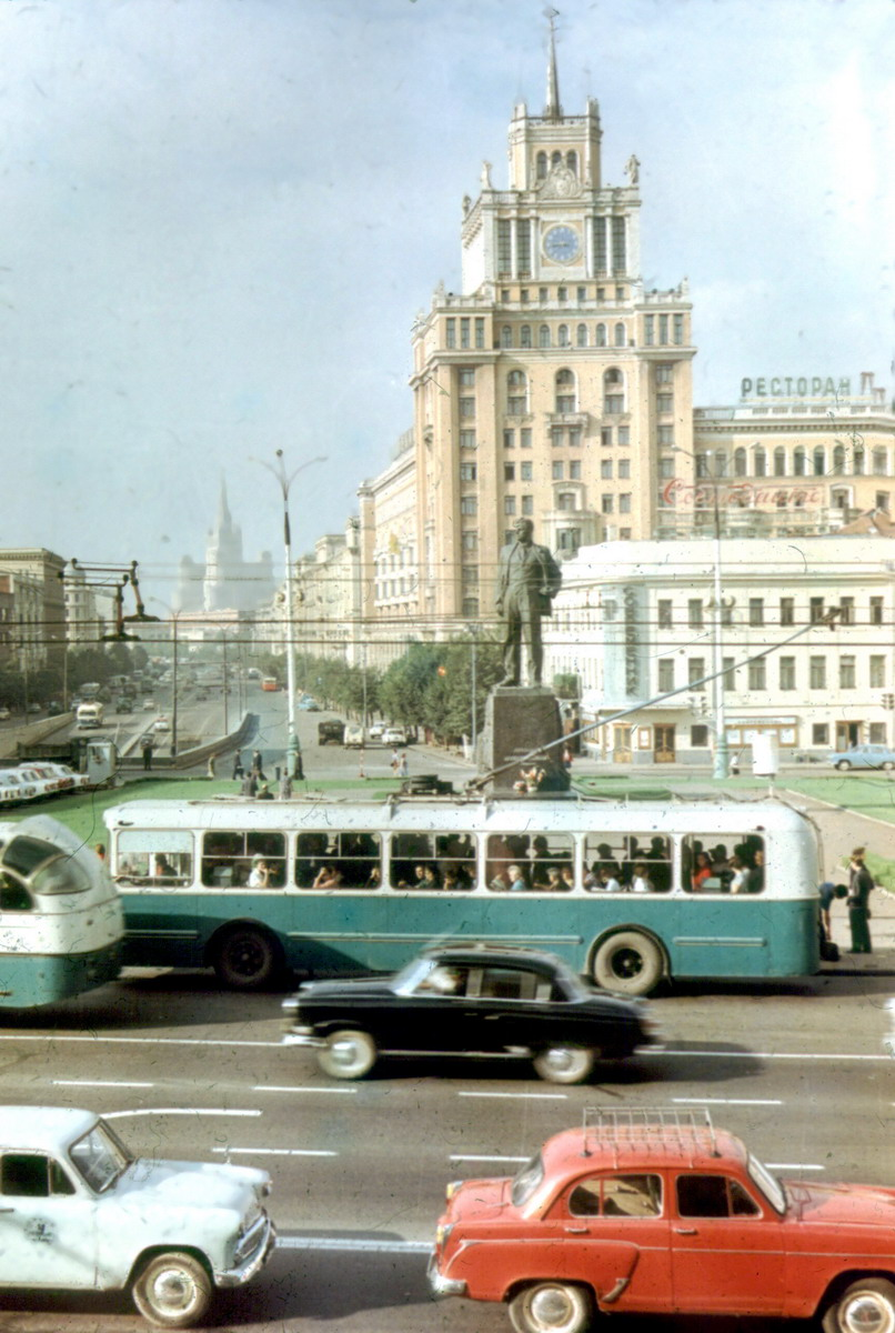 Москва 1970